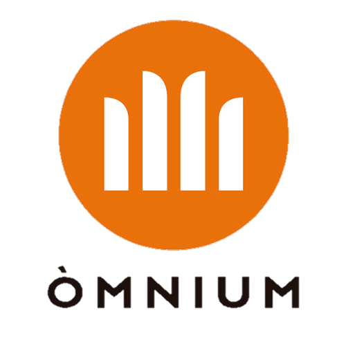 logo òmnium